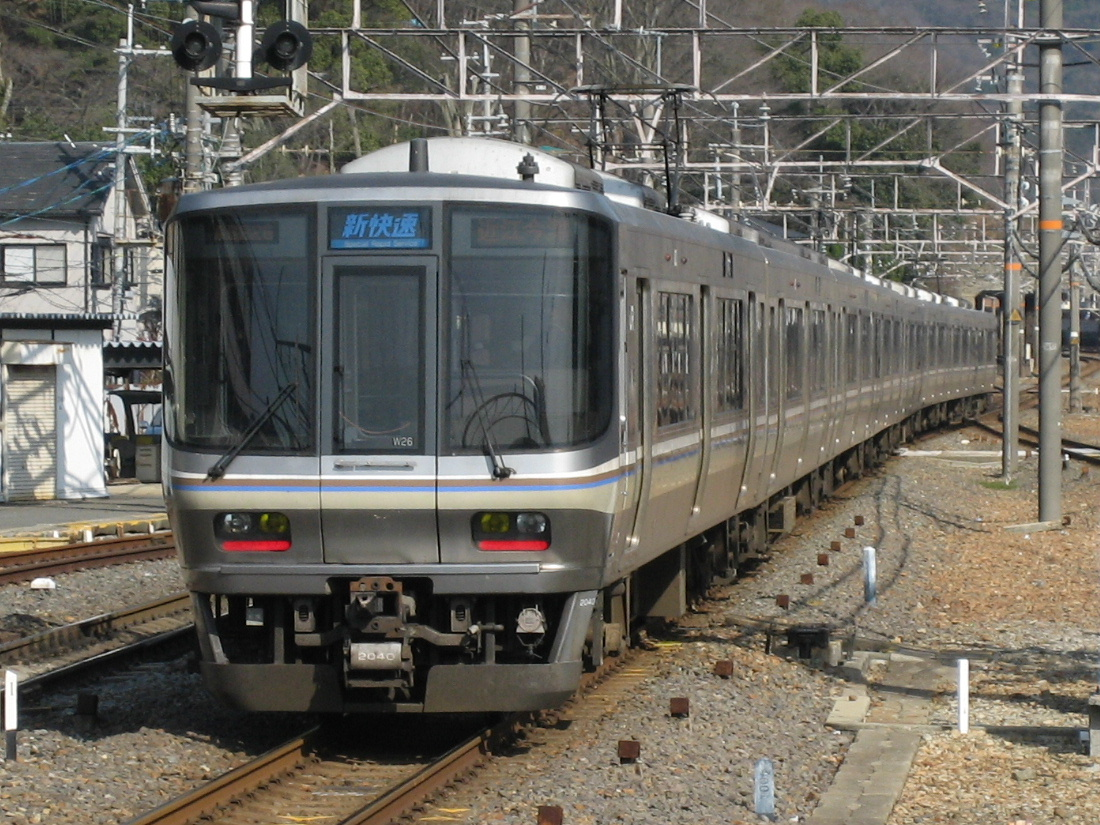 西日本旅客鉄道